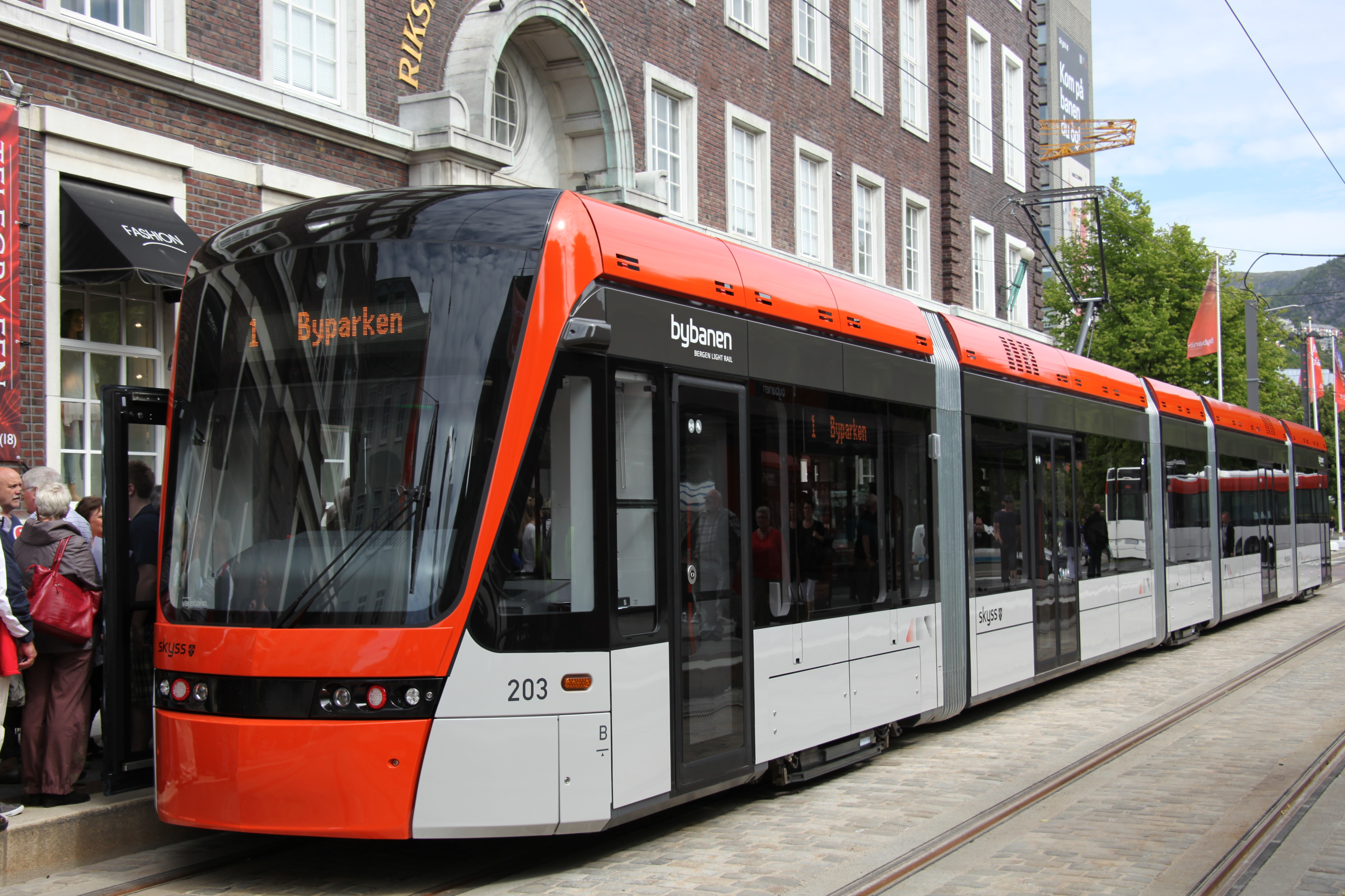 Bybanen 23. juni 2010